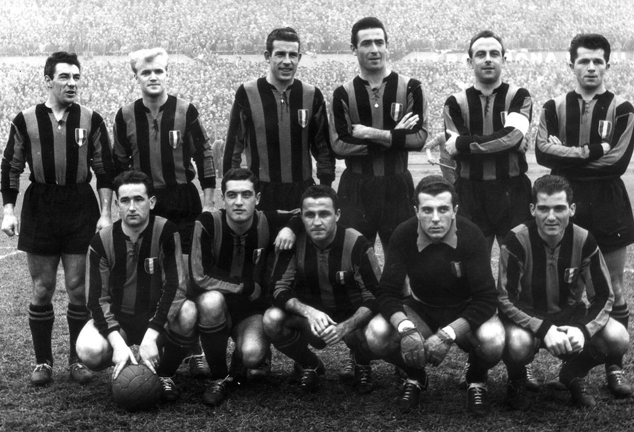 A line-up of Inter Milan in the 1953–54 season. From left to right, standing: B. Lorenzi, L. Skoglund, F. Nesti, B. Mazza, A. Giovannini (captain), I. Nyers; crouched: B. Padulazzi, G. Armano, M. Neri, G. Ghezzi, G. Giacomazzi.